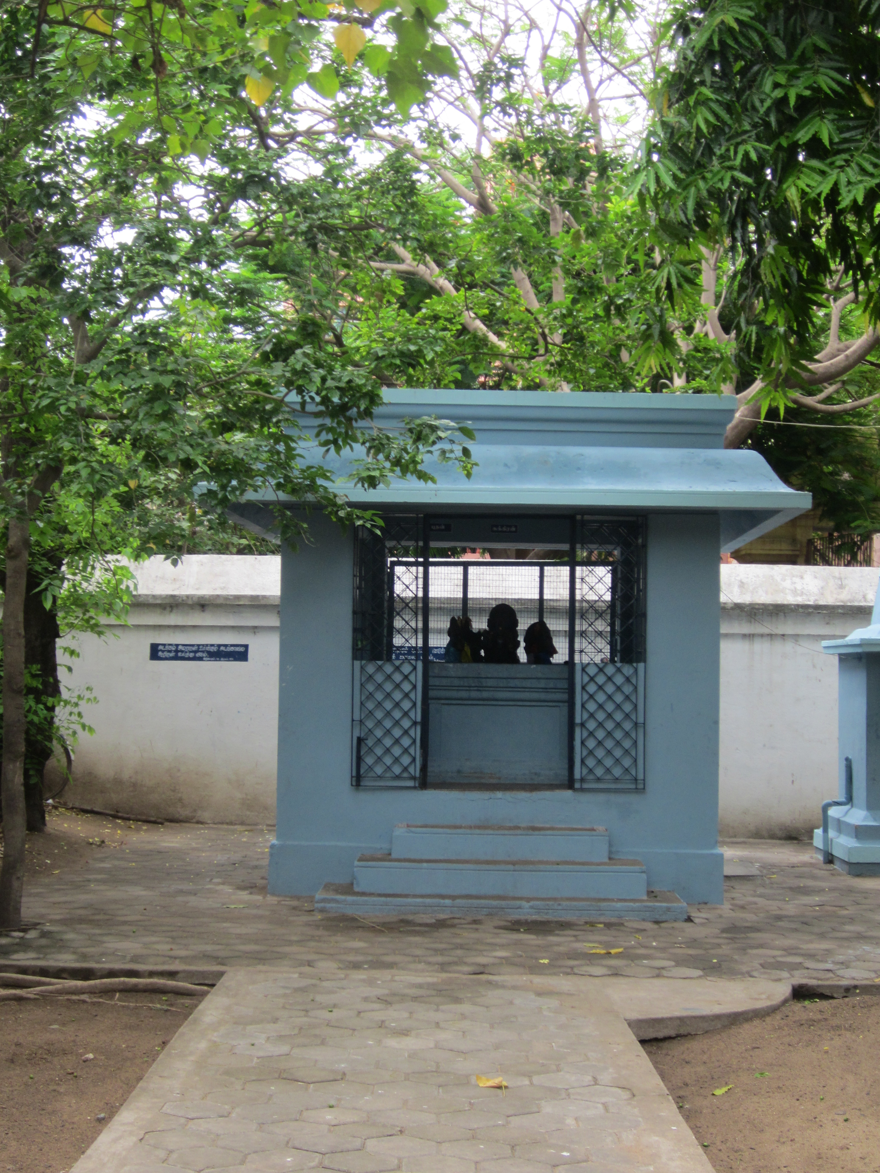 Inside Thiruvalluvar Temple in Mylapore.. A distant view of statues of Thiruvalluvar, his wife and other deities